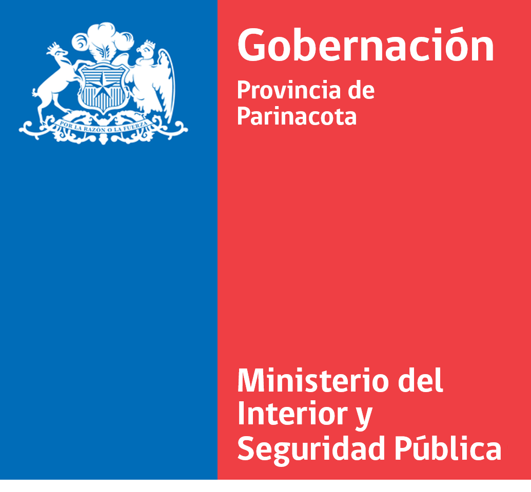 Logotipo de la gobernación provincial, usado desde 2010, durante la administración de Sebastián Piñera.